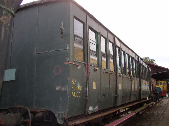 Voiture État à deux essieux, Gare de Pont-Erambourg. oeuvre personnelle Date= 17 novembre 2006 Auteur= Bruno Robert (2catalo)